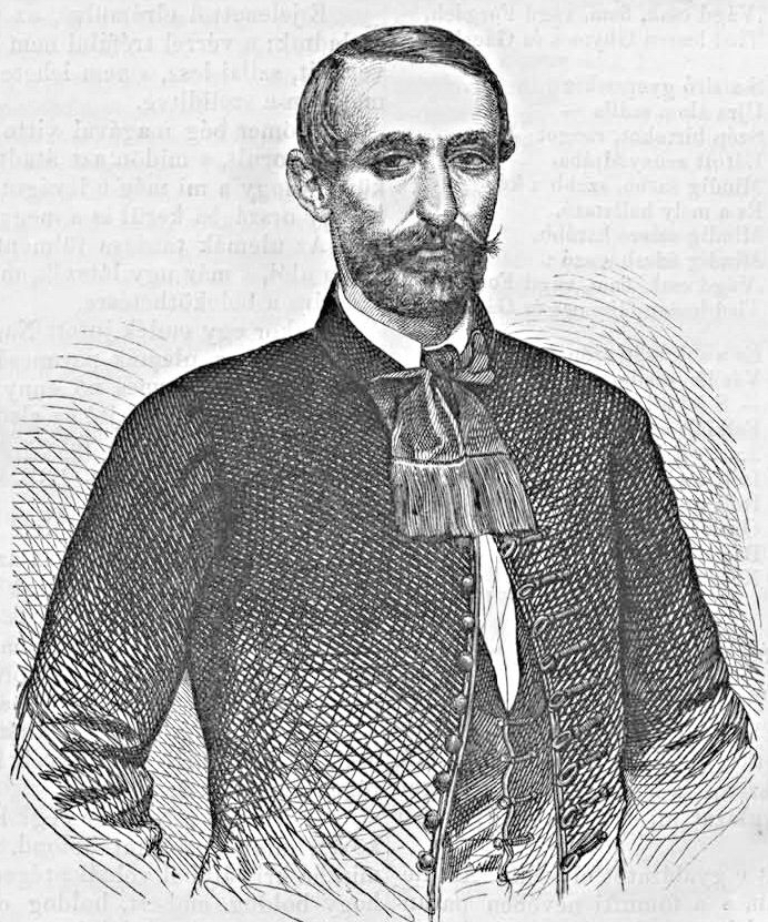 Tisza Kálmán (1830–1902) politikus, miniszterelnök (Vasárnapi Ujság, 1861. szeptember 15.)